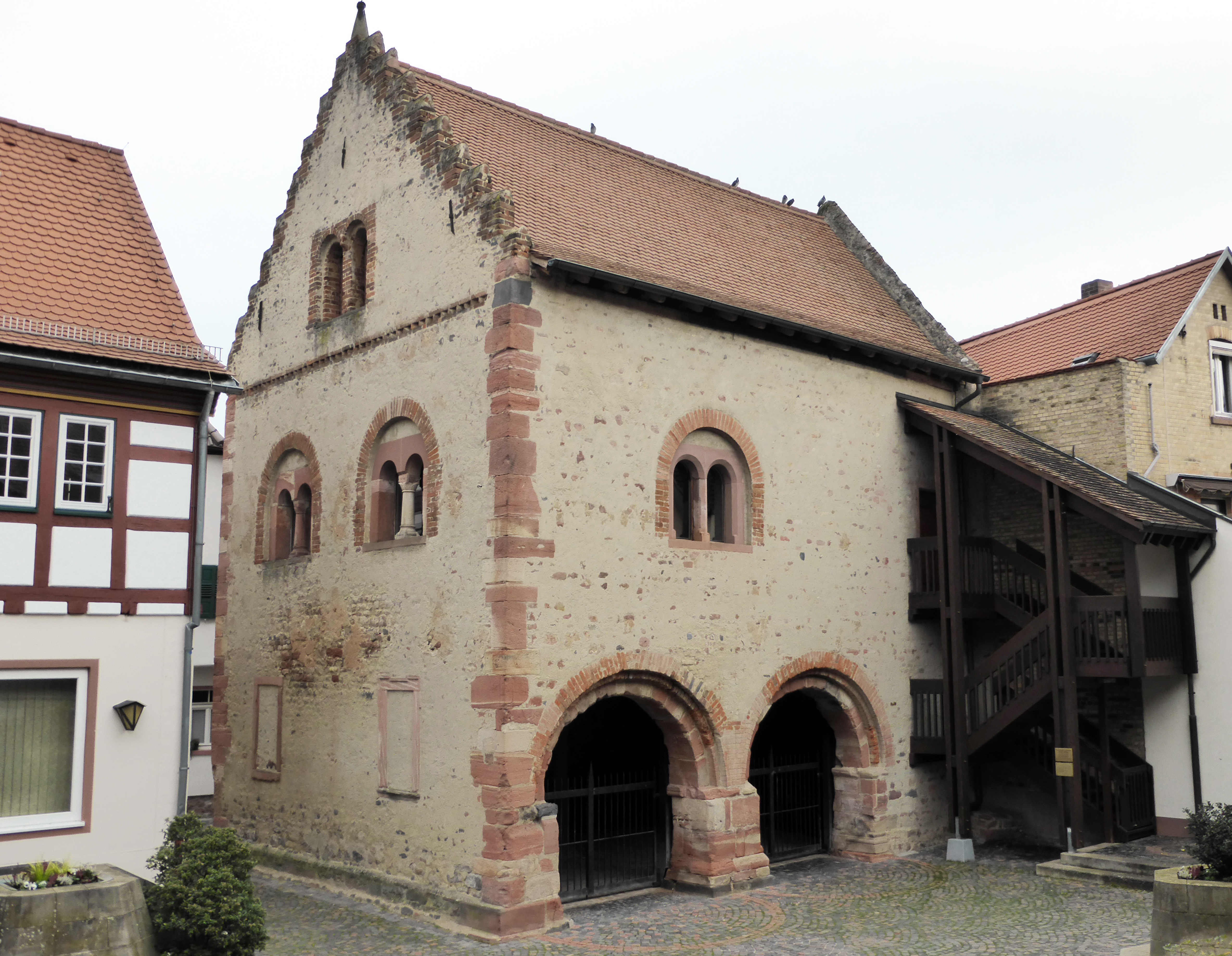 Romanisches Steinhaus in Seligenstadt.